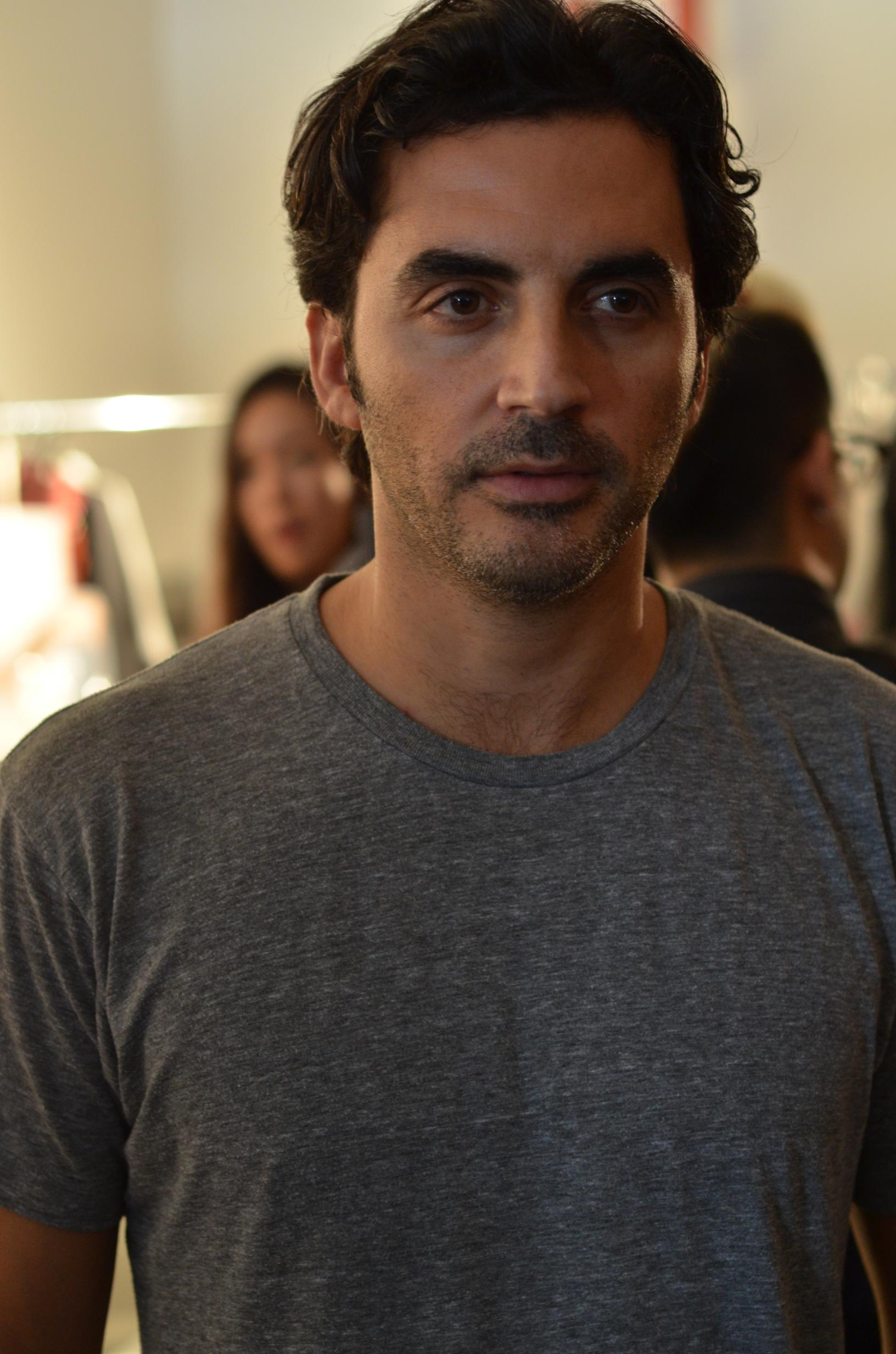 Yigal Azrouel